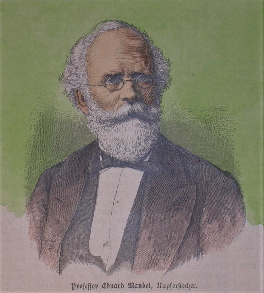 Professor Eduard Mandel, Kupferstecher, teilkolorierter Holzstich, ca. 11 x 9,5 cm